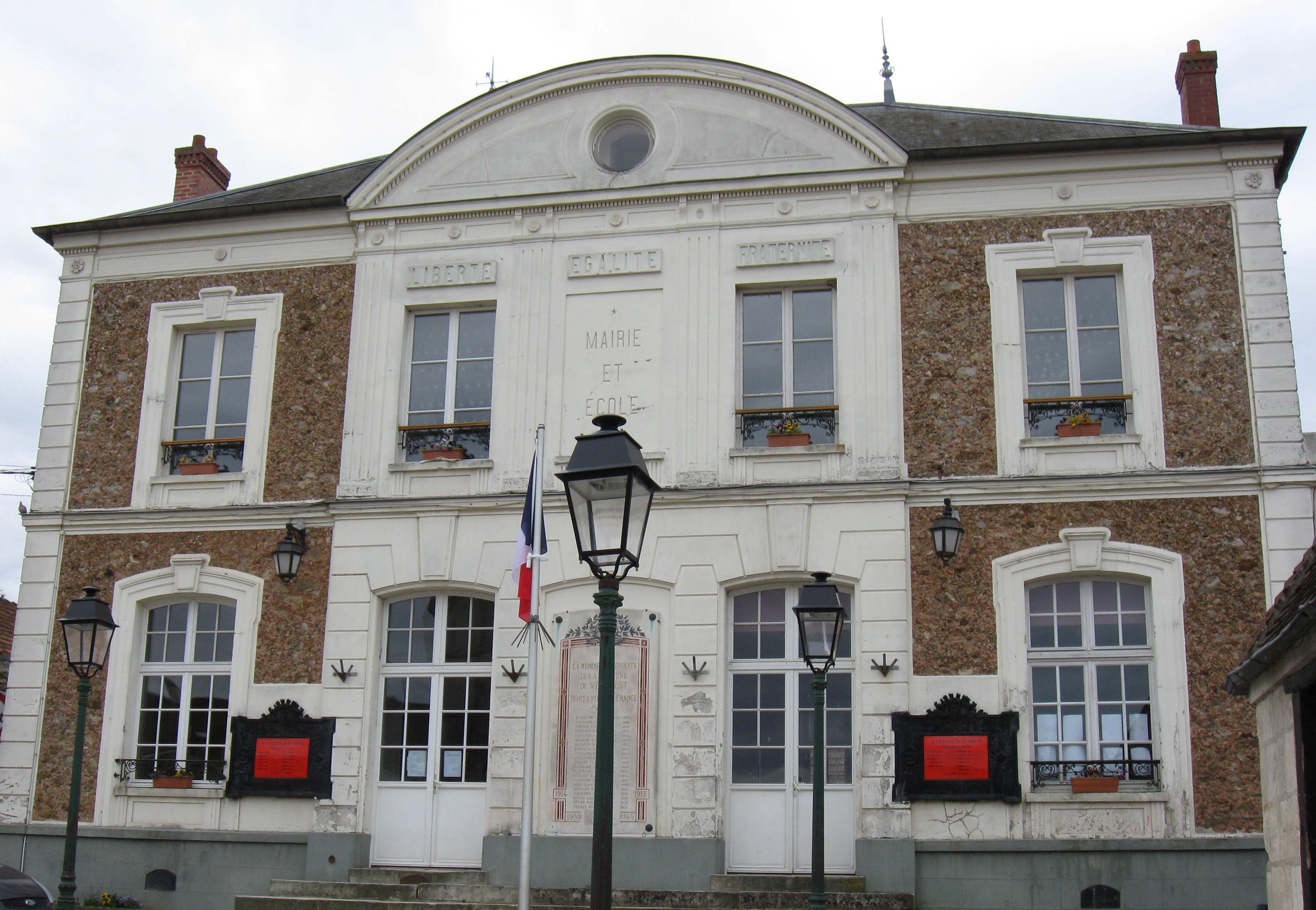 Mairie de Vendrest . (département de la Seine-et-Marne, région Île-de-France).